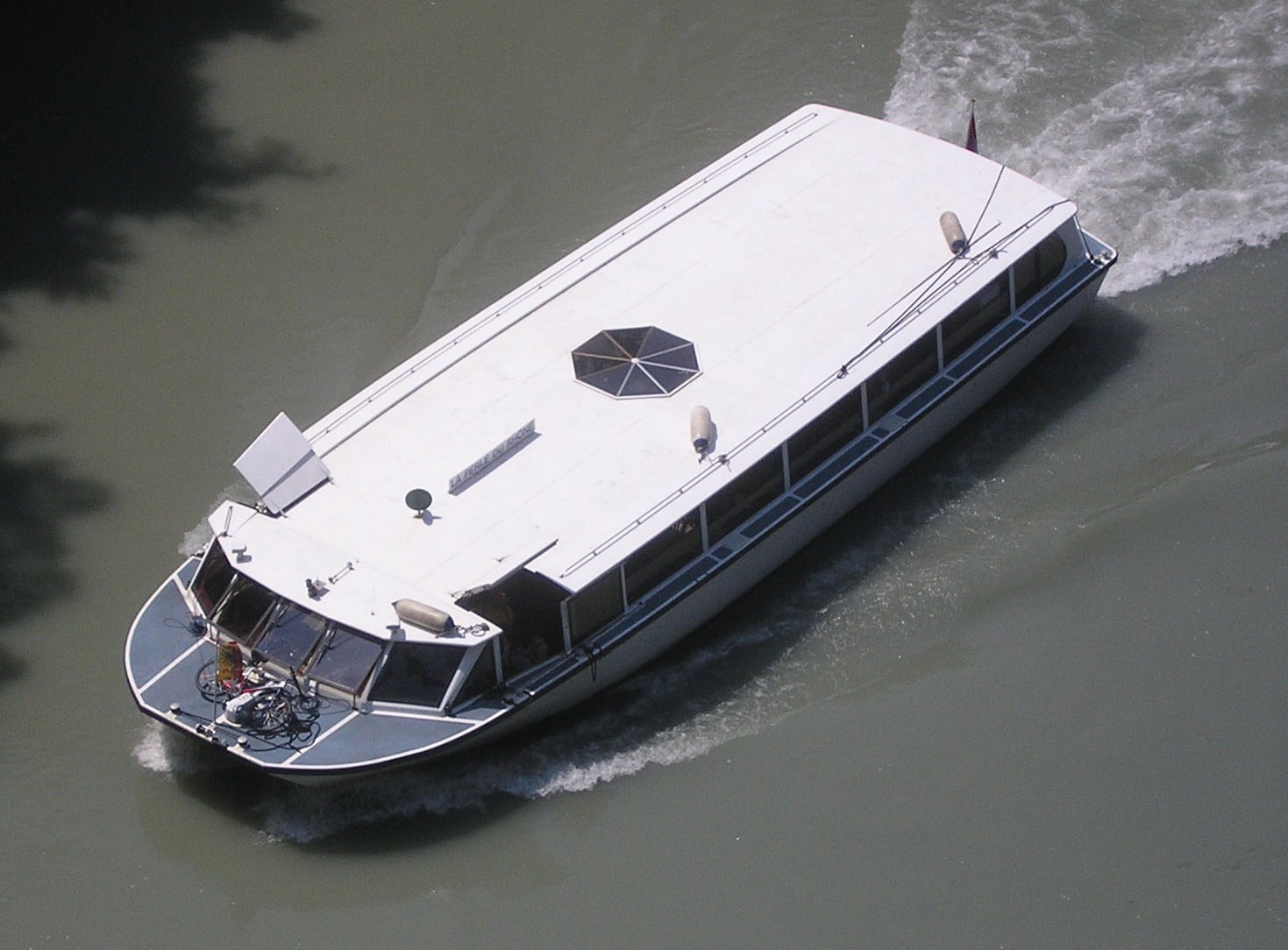 « La Perle du Rhône », , bateau de la compagnie « Swissboat », sur le Rhône à Genève. Photographié depuis le pont Butin.